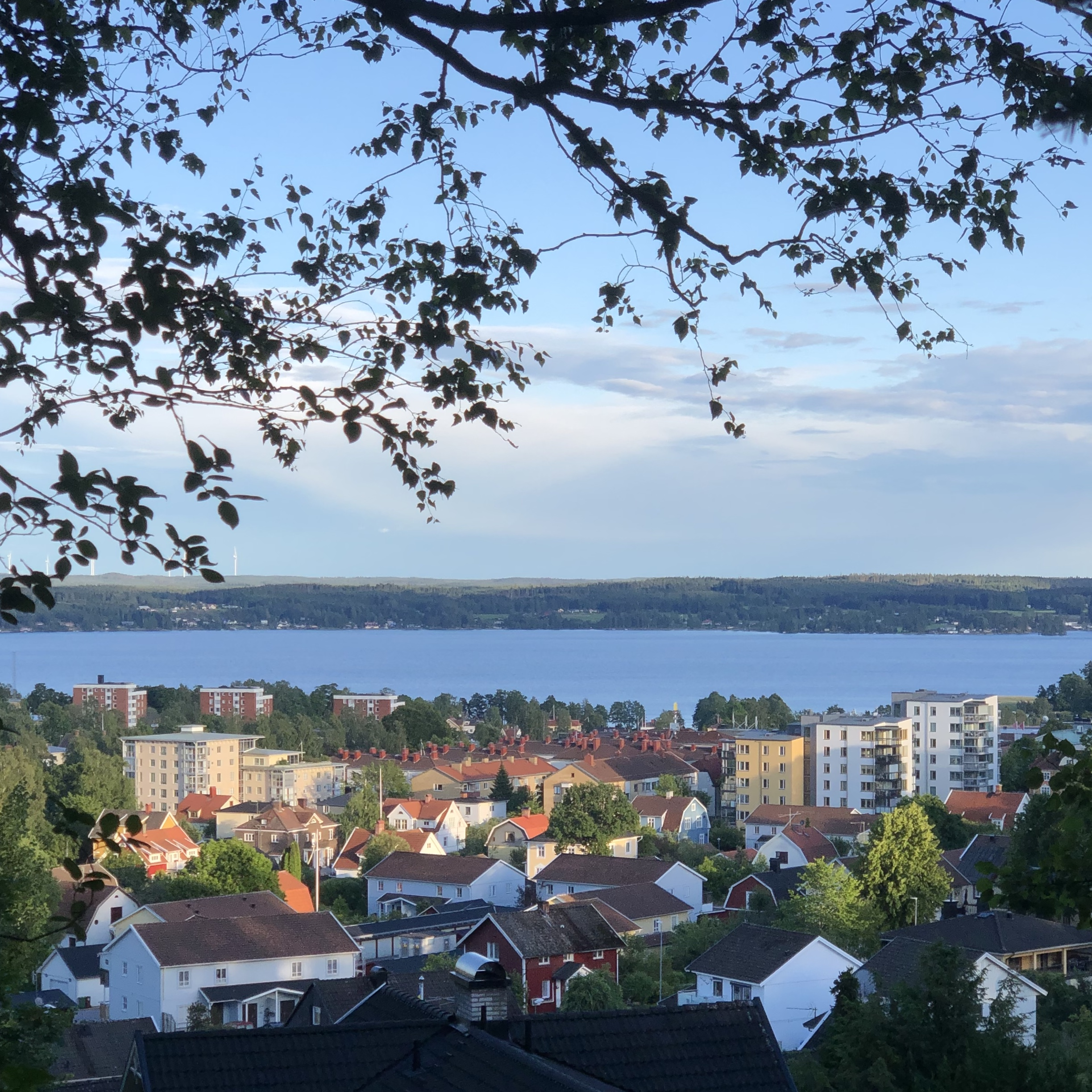 Bild över Karlskoga och sjön Möckeln